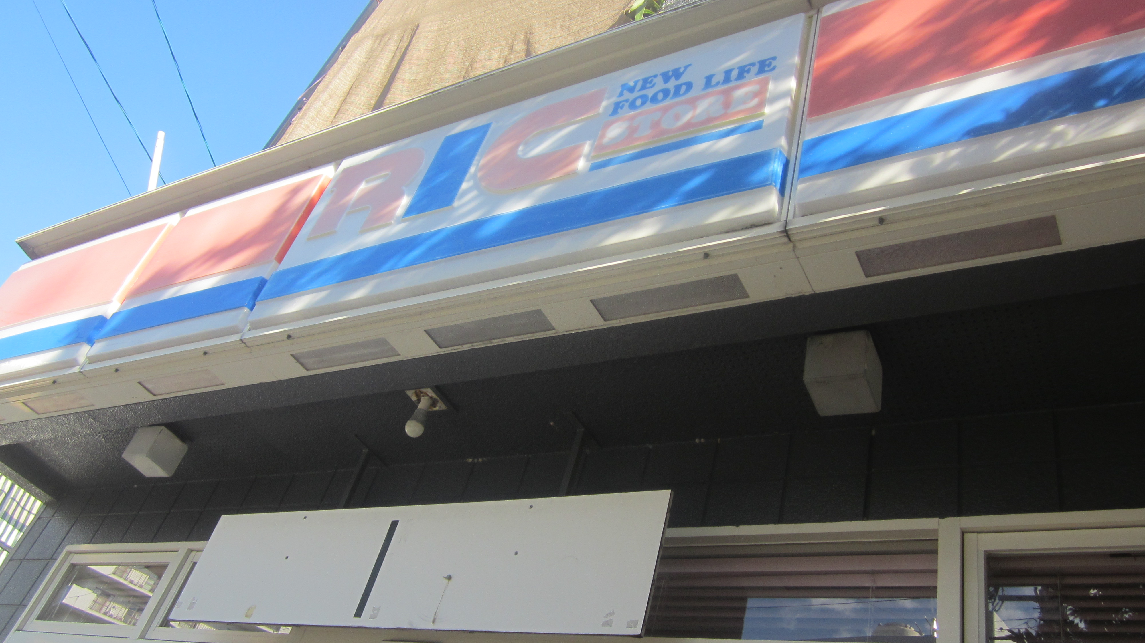 RICの店舗の例